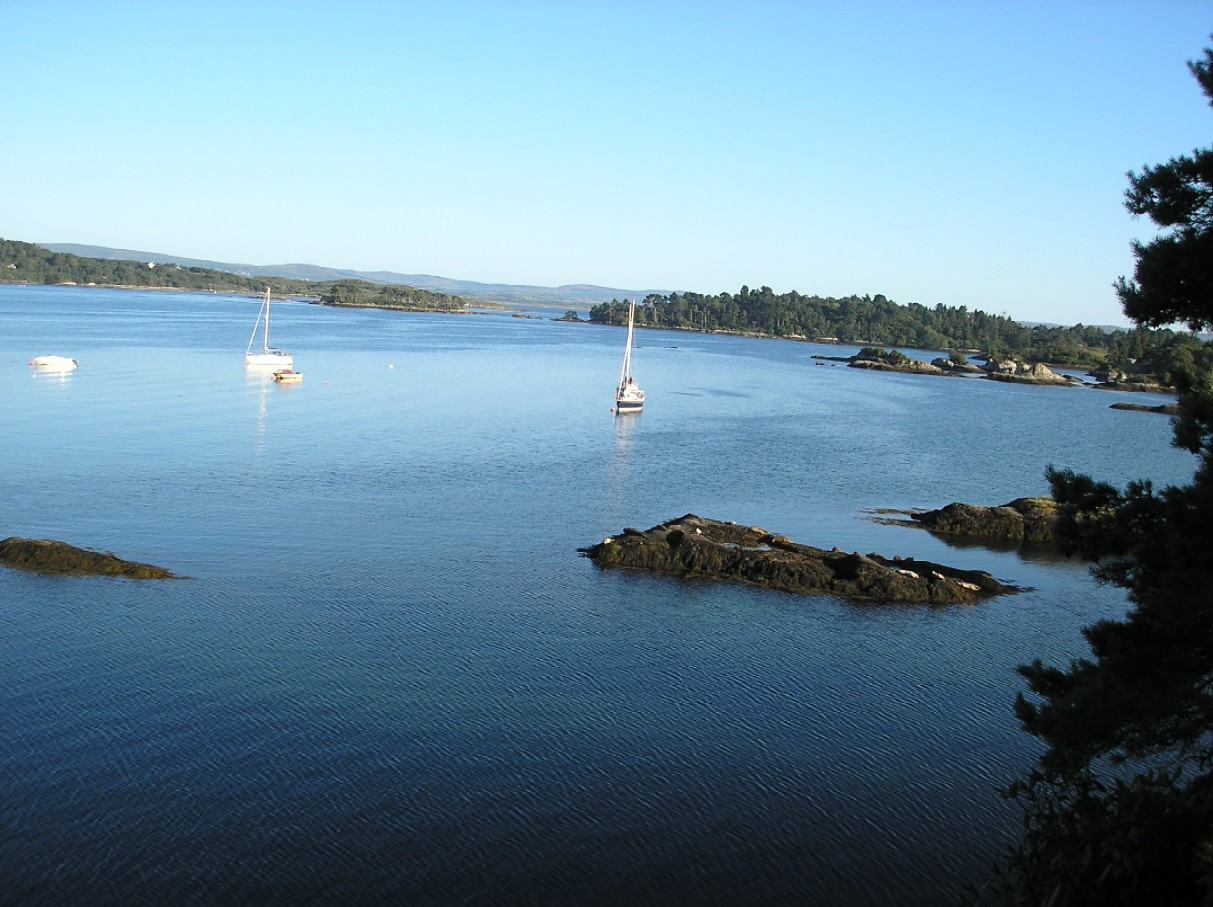 taken by valdoria august 2006